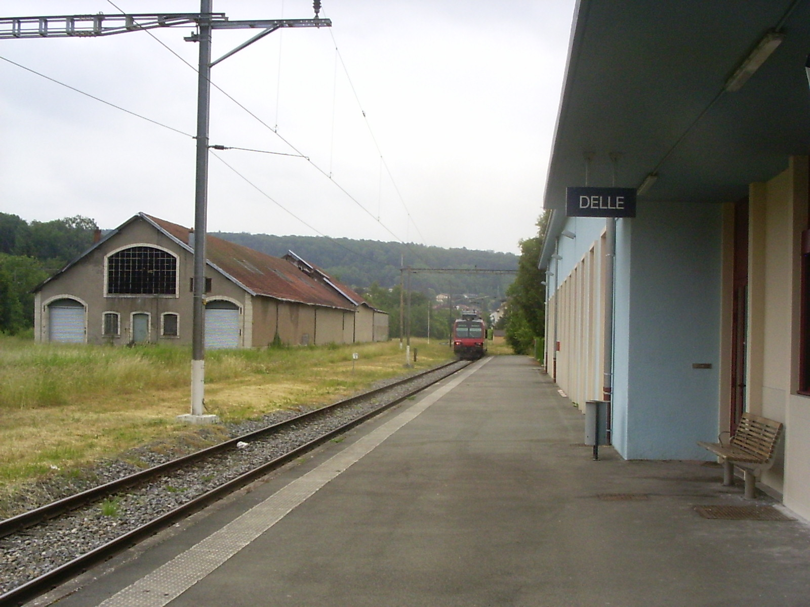 Station Delle